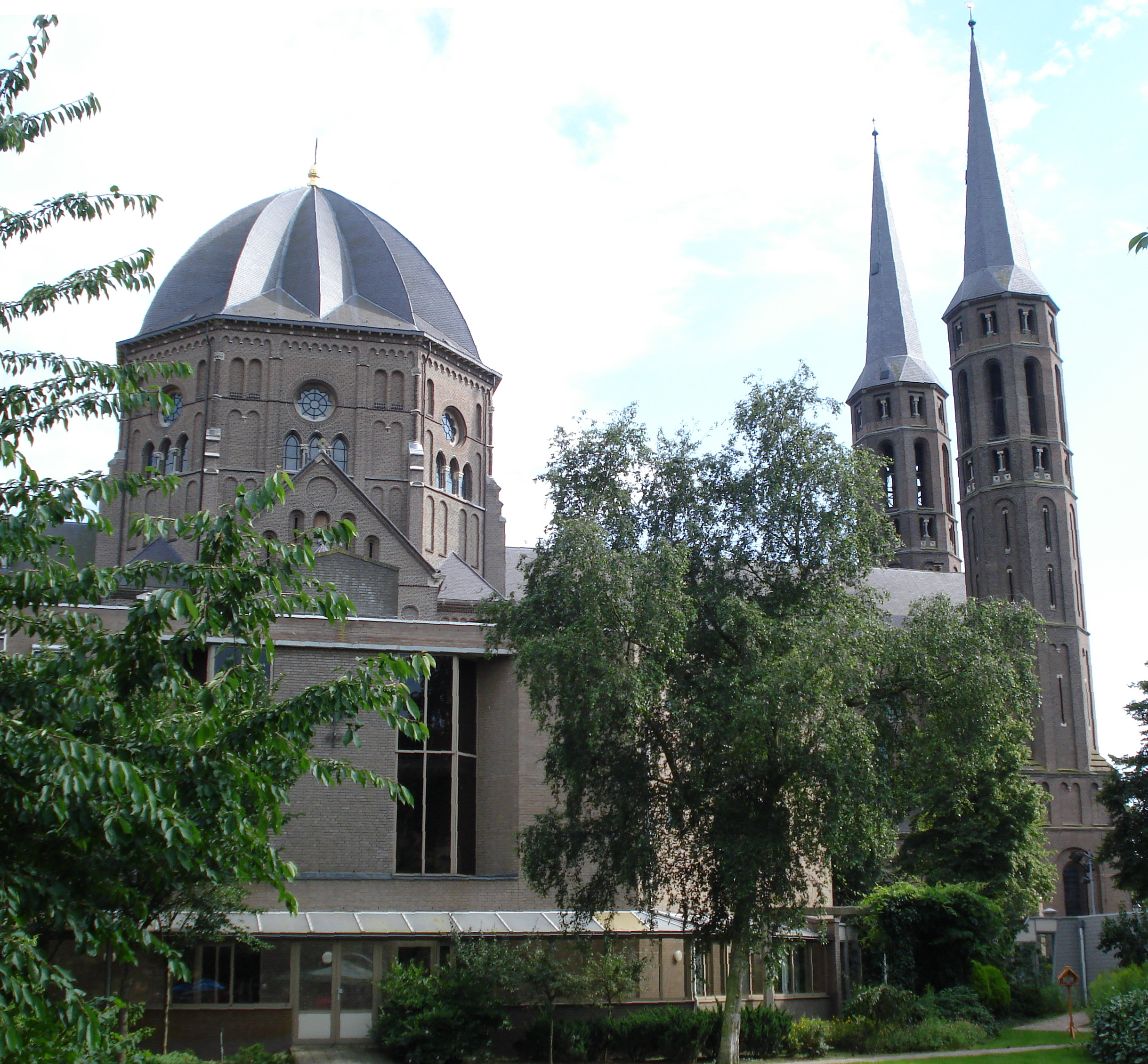 Uden Rijksmonument 35829 kerk St.Petrus'stoel van Antiochie 64″ N, 5° 36′ 42.13″ E